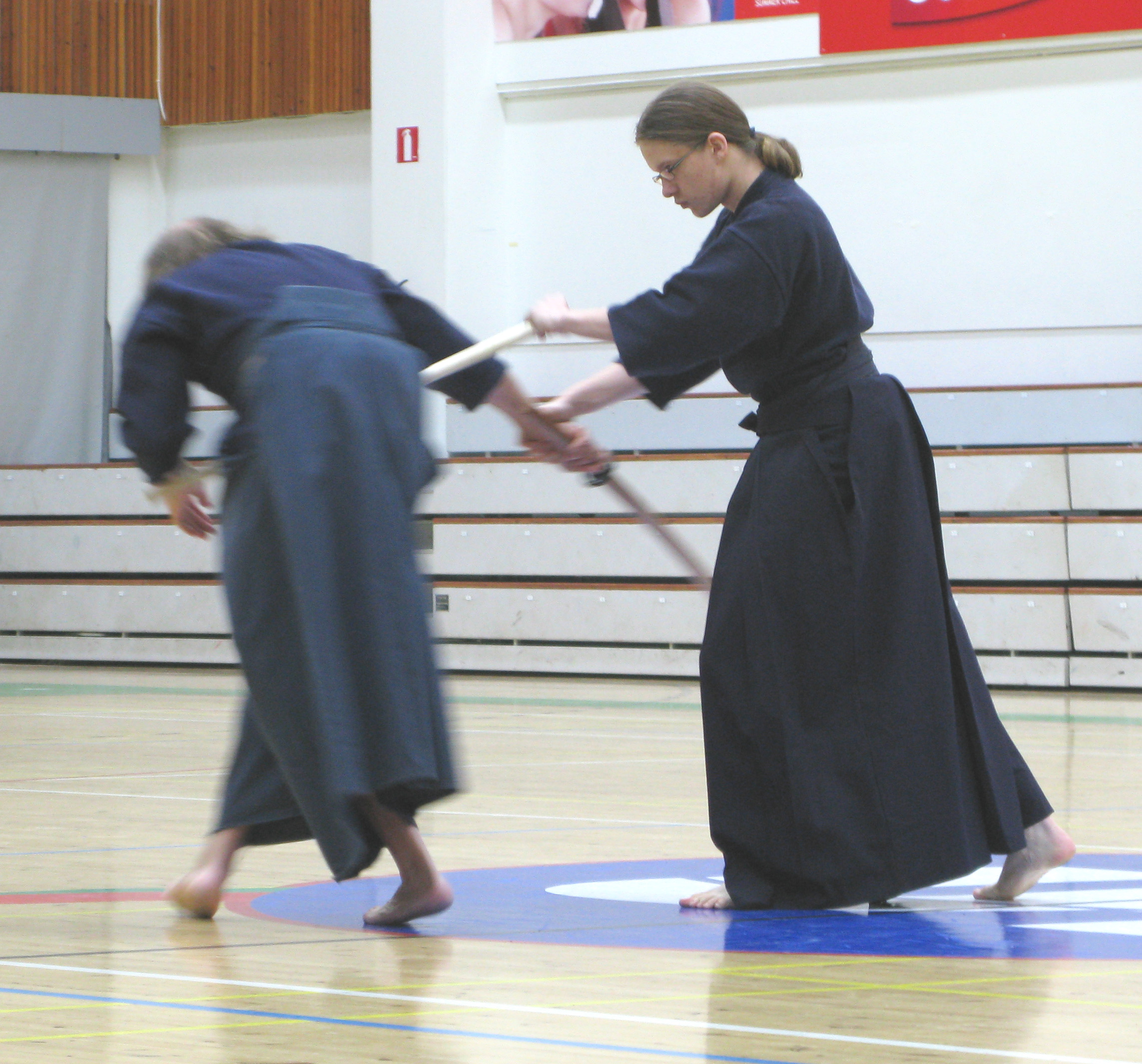 Tanjolla tehtävä käsilukko muodostuu